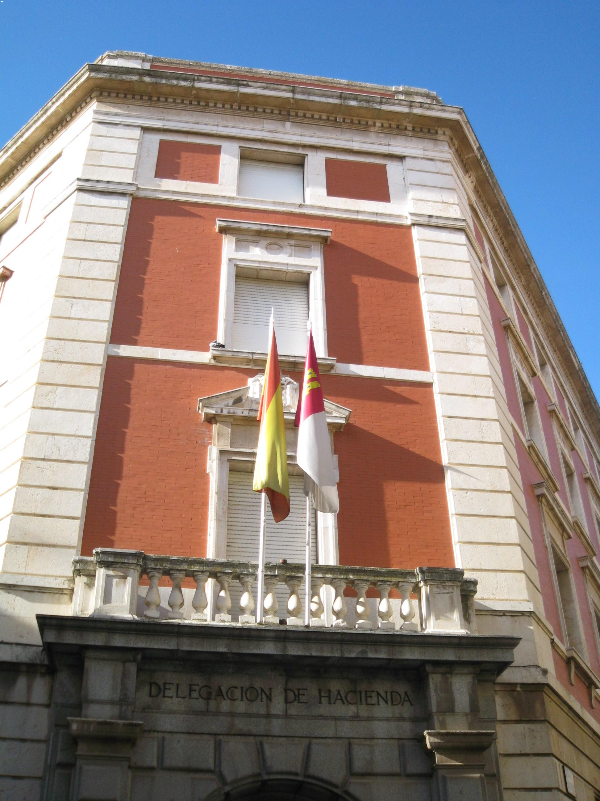 Delegación de Hacienda in Guadalajara, Spain